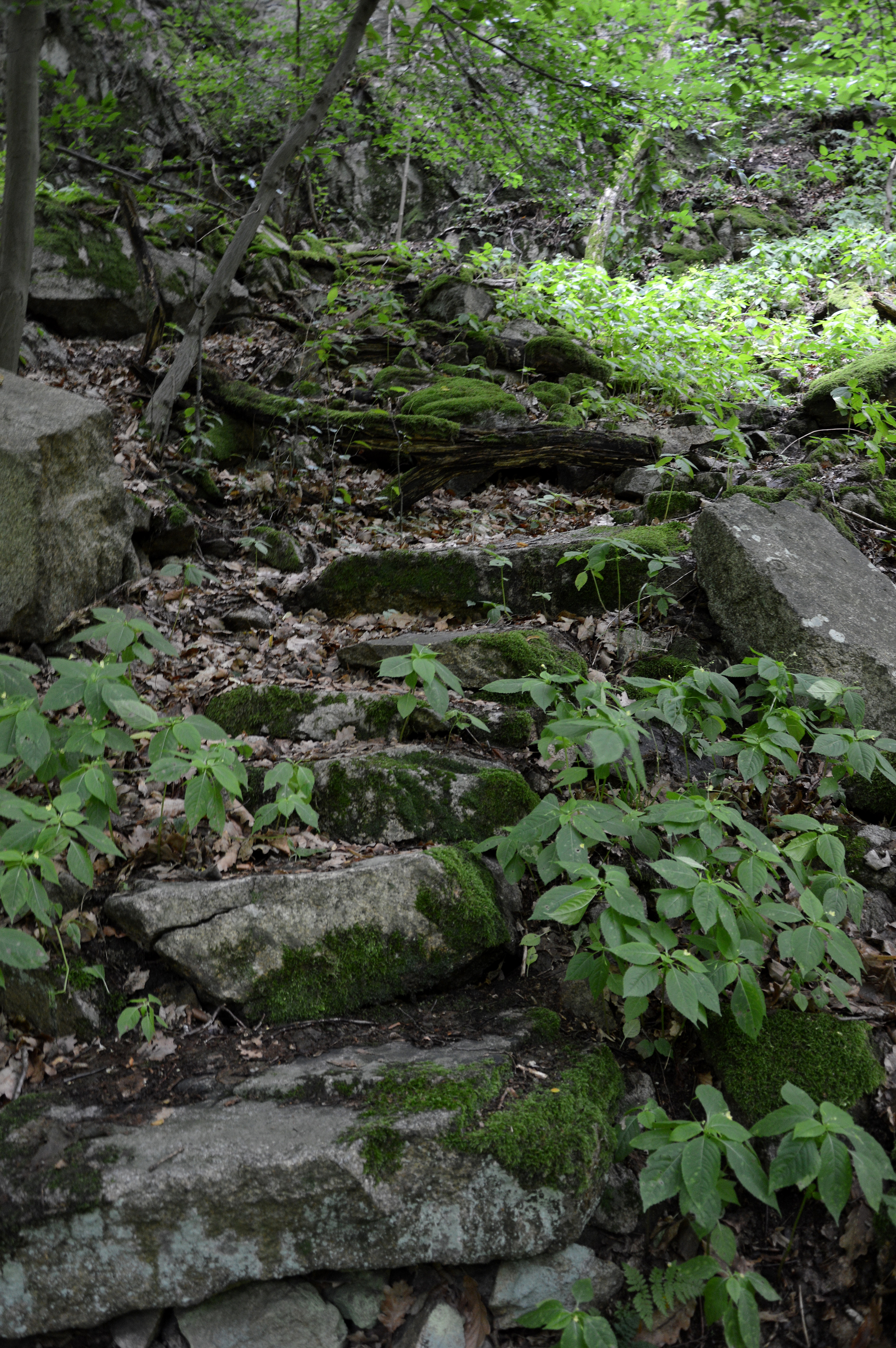 Stufen des Zinnoberstiegs